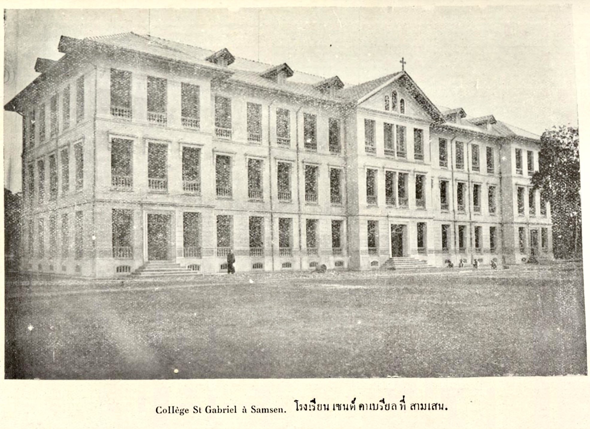 ภาพภ่ายเก่าของโรงเรียนเซนต์คาเบรียล